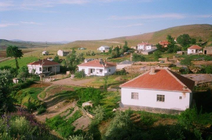 Kaymak köyü tepeden görüntüsü